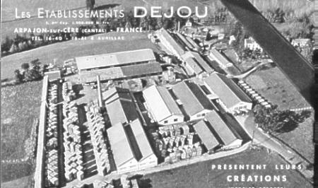 Les jouets Dejou